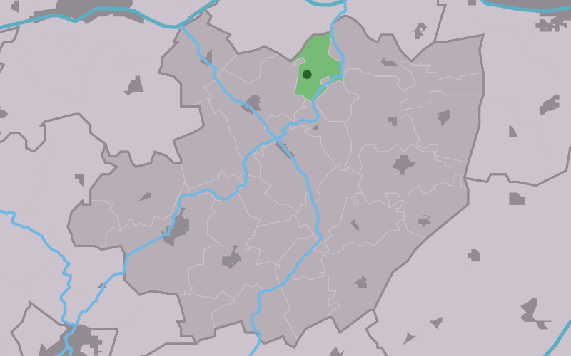 Kaartsje fan himrik fan Húns